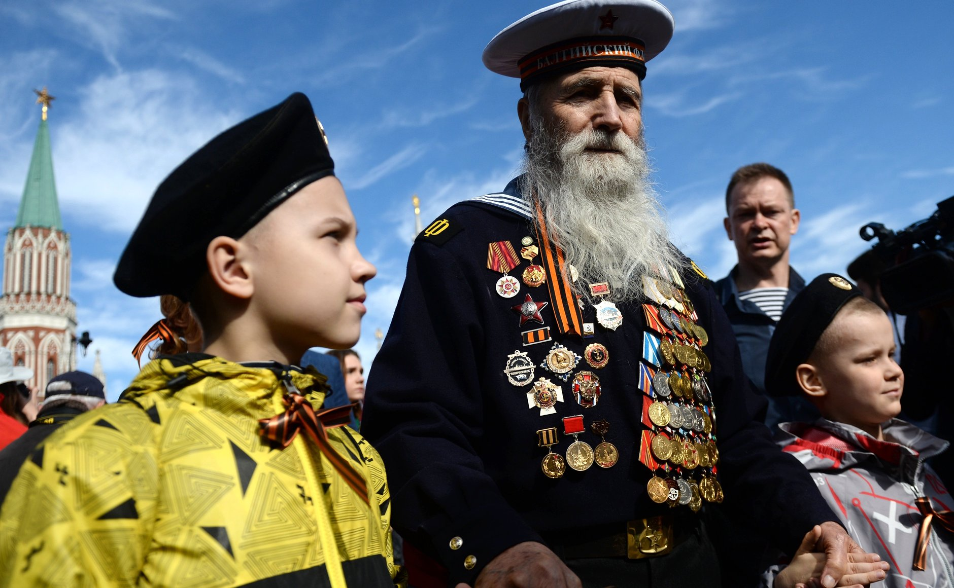 Военный парад в ознаменование 70-й годовщины Победы в Великой Отечественной войне 1941–1945 годов.